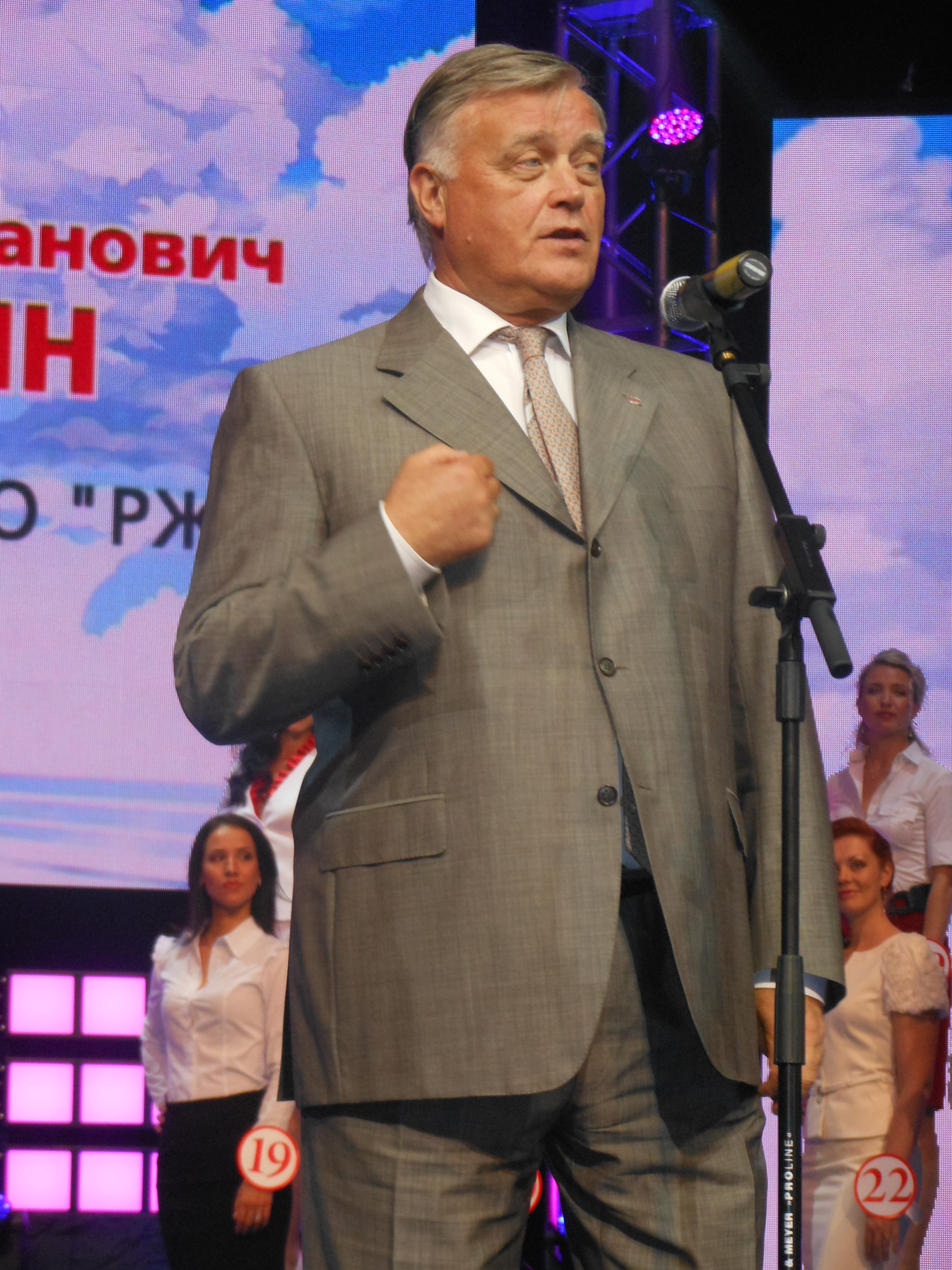 Владимир Якунин на конкурсе красоты ОАО "РЖД"